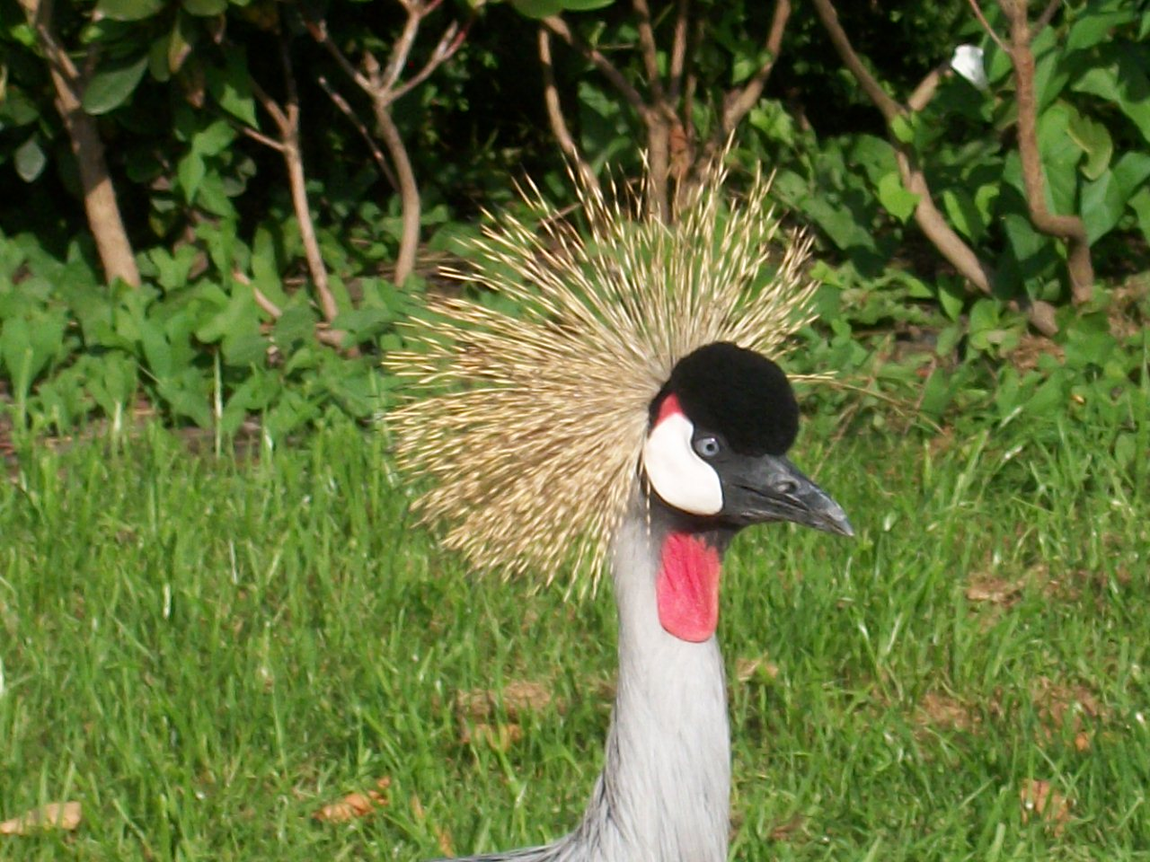 Koronnik szary (Balearica regulorum) w Parku Miejskim w Andrychowie.